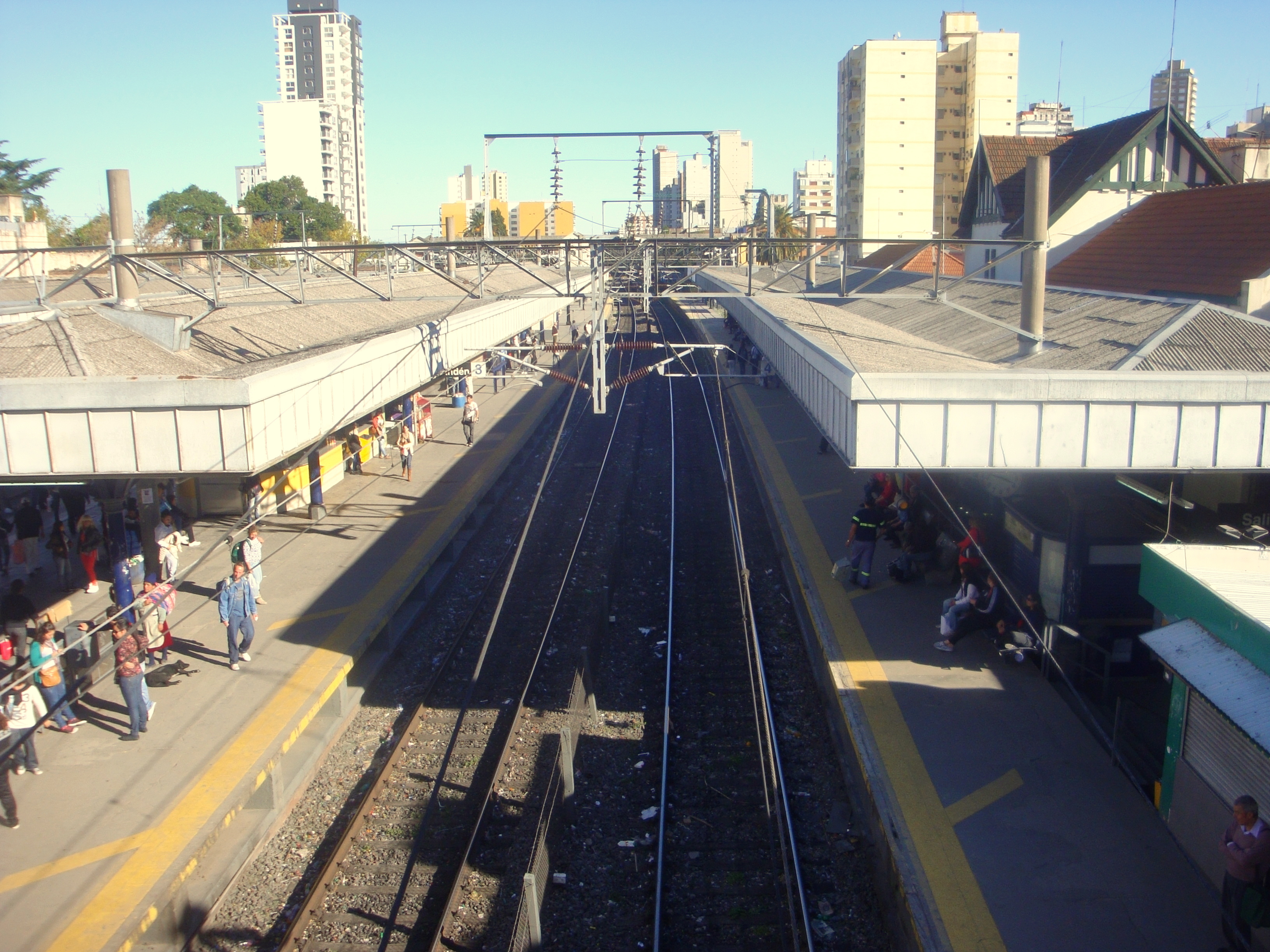 Vista de los andenes de la estación Lomas de Zamora, en sentido sur.